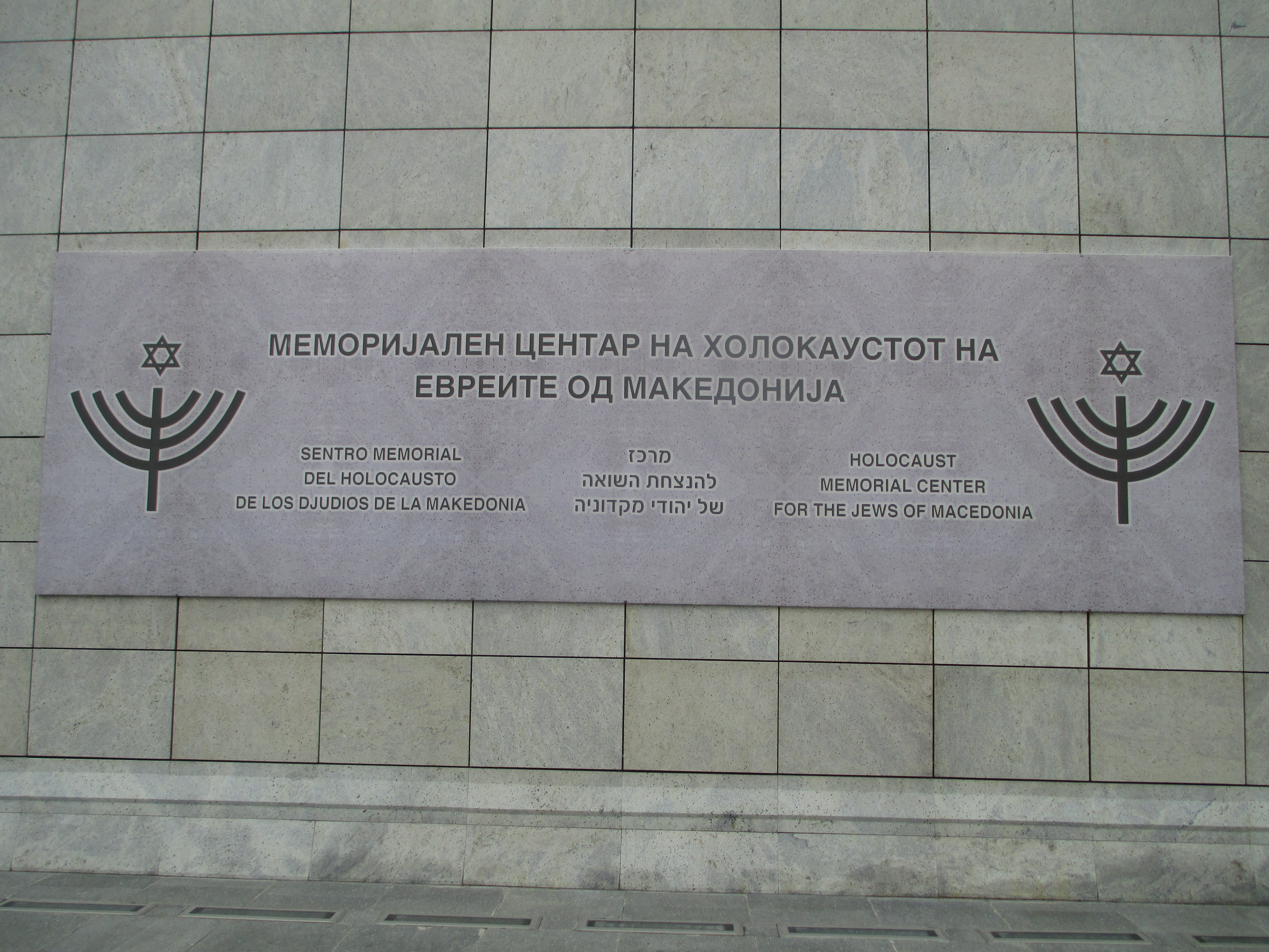 המרכז להנצחת השואה של יהודי מקדוניה בסקופיה